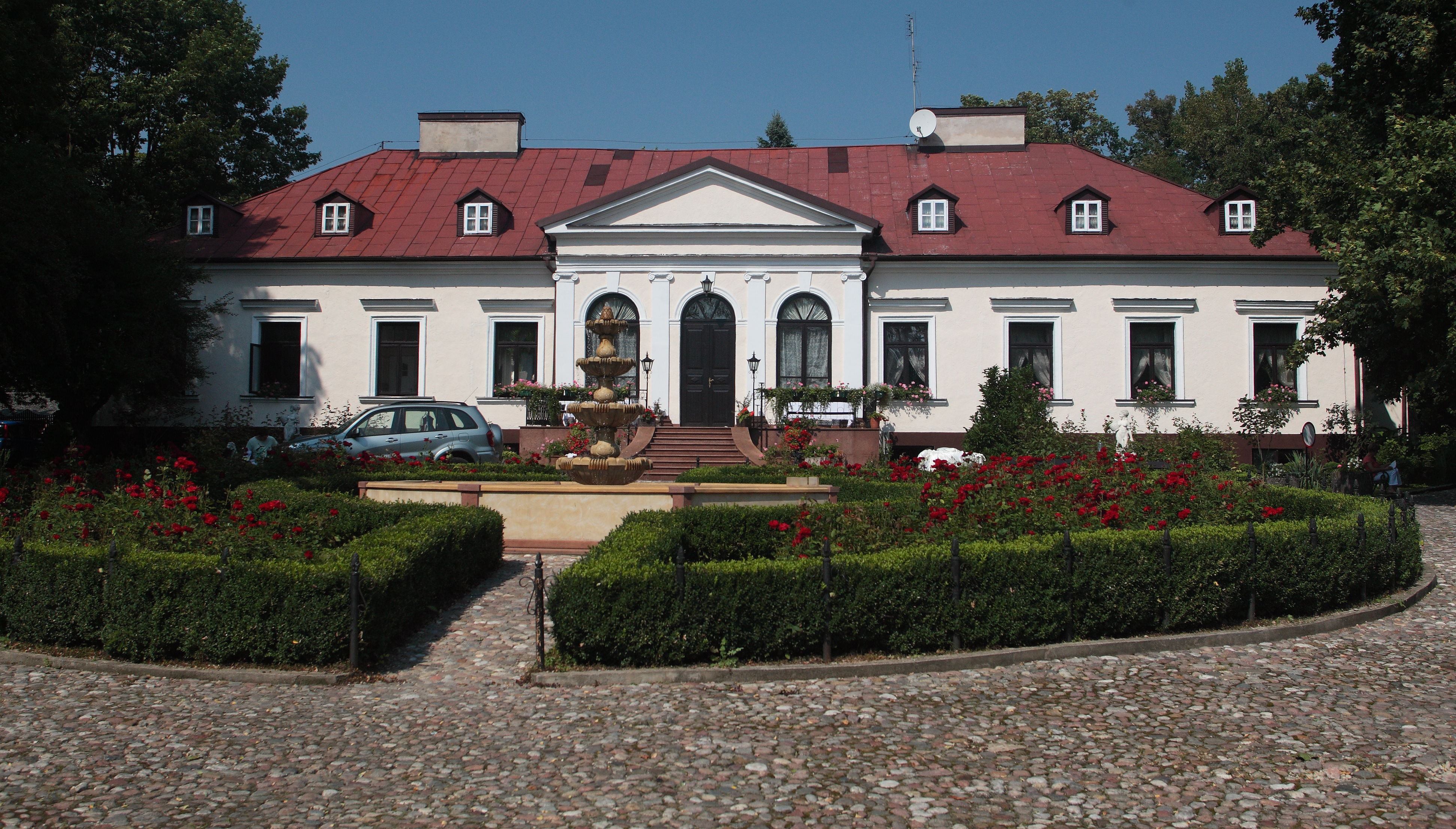 Dworek w Zameczku koło Przytyka